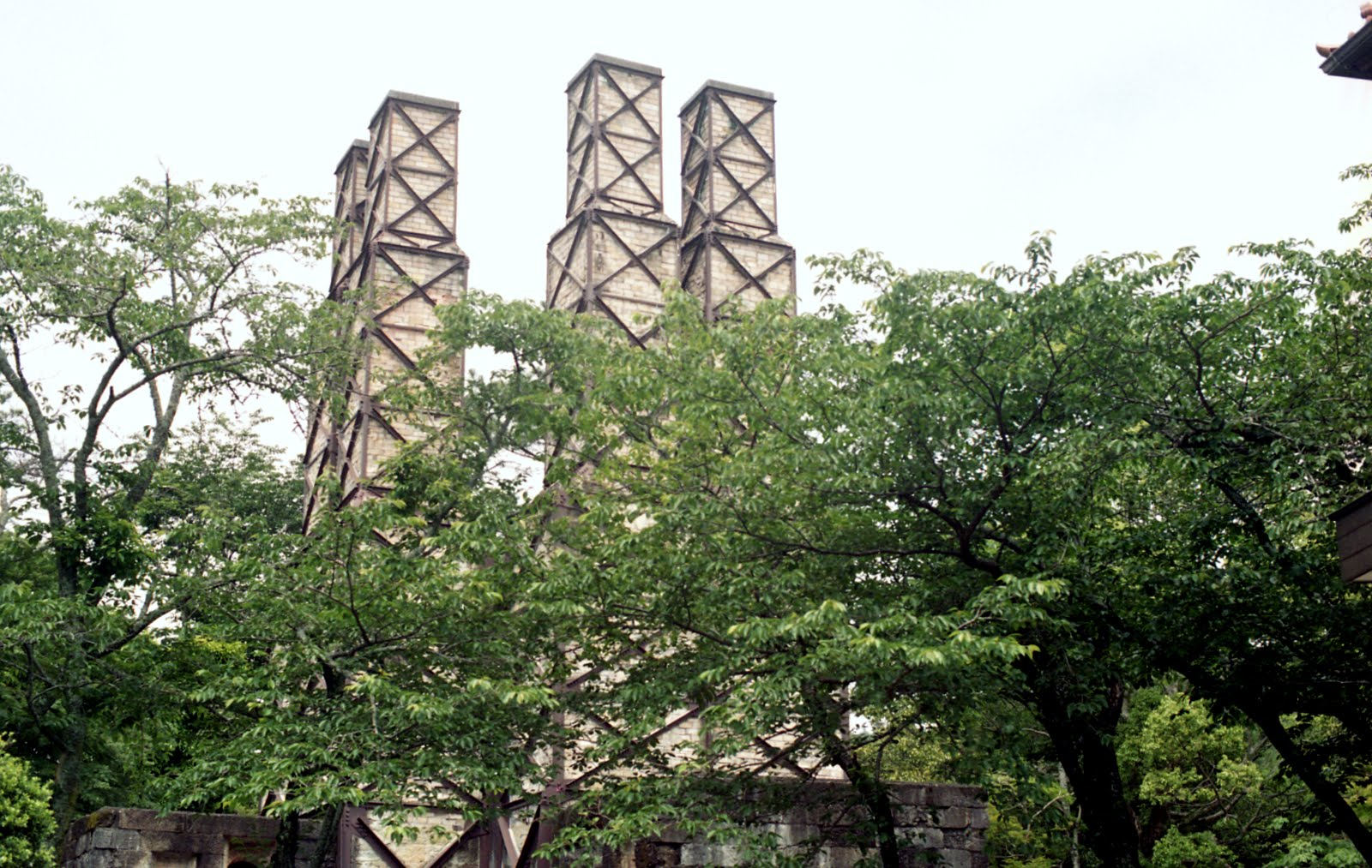 韮山反射炉